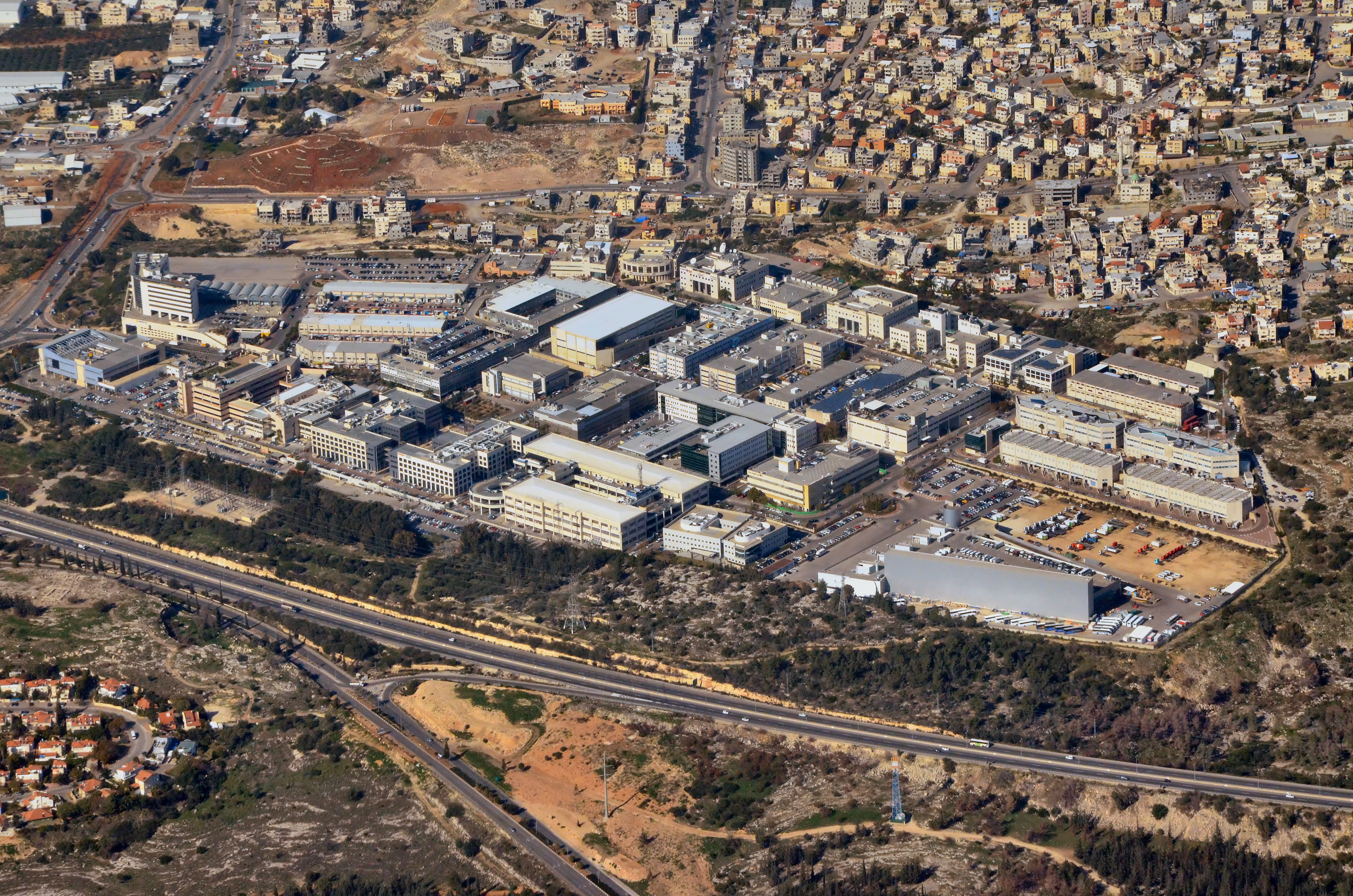 אזור תעשיה פארק אפק